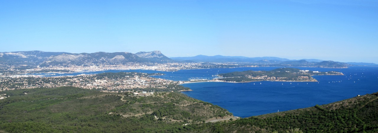 Vue sur Toulon, la Seyne sur Mer, la rade et la presqu'ile de Saint Mandrier